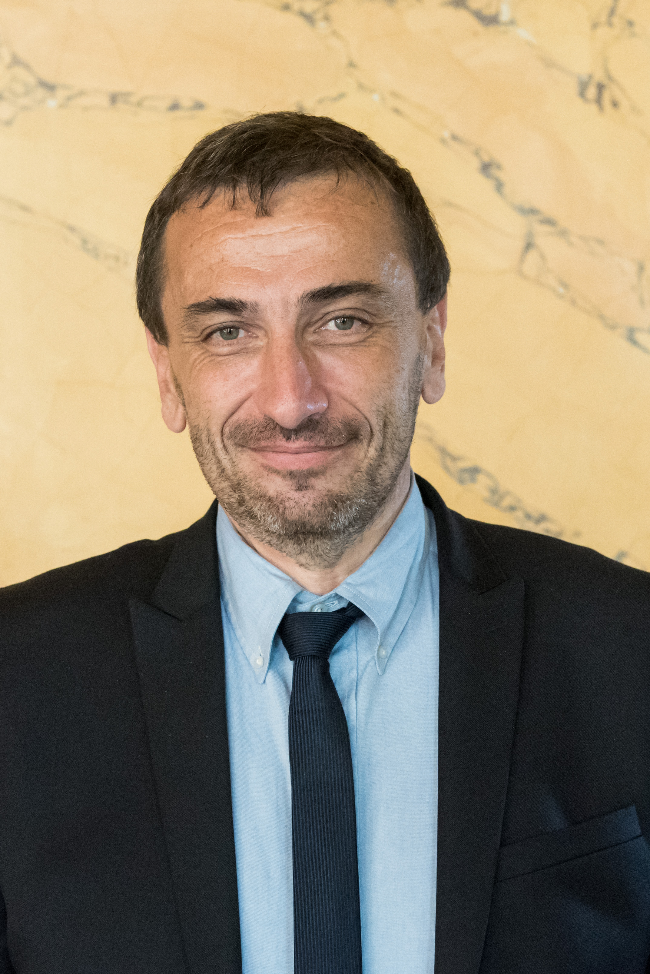 Paul-André Colombani dans la salle des Quatre colonnes du palais Bourbon en 2017.